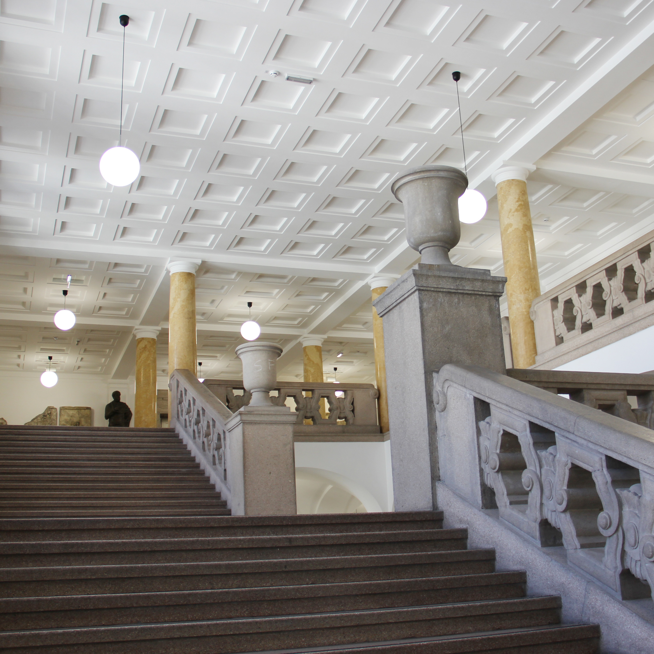 Blick in das Hauptgebäude der Universität Innsbruck